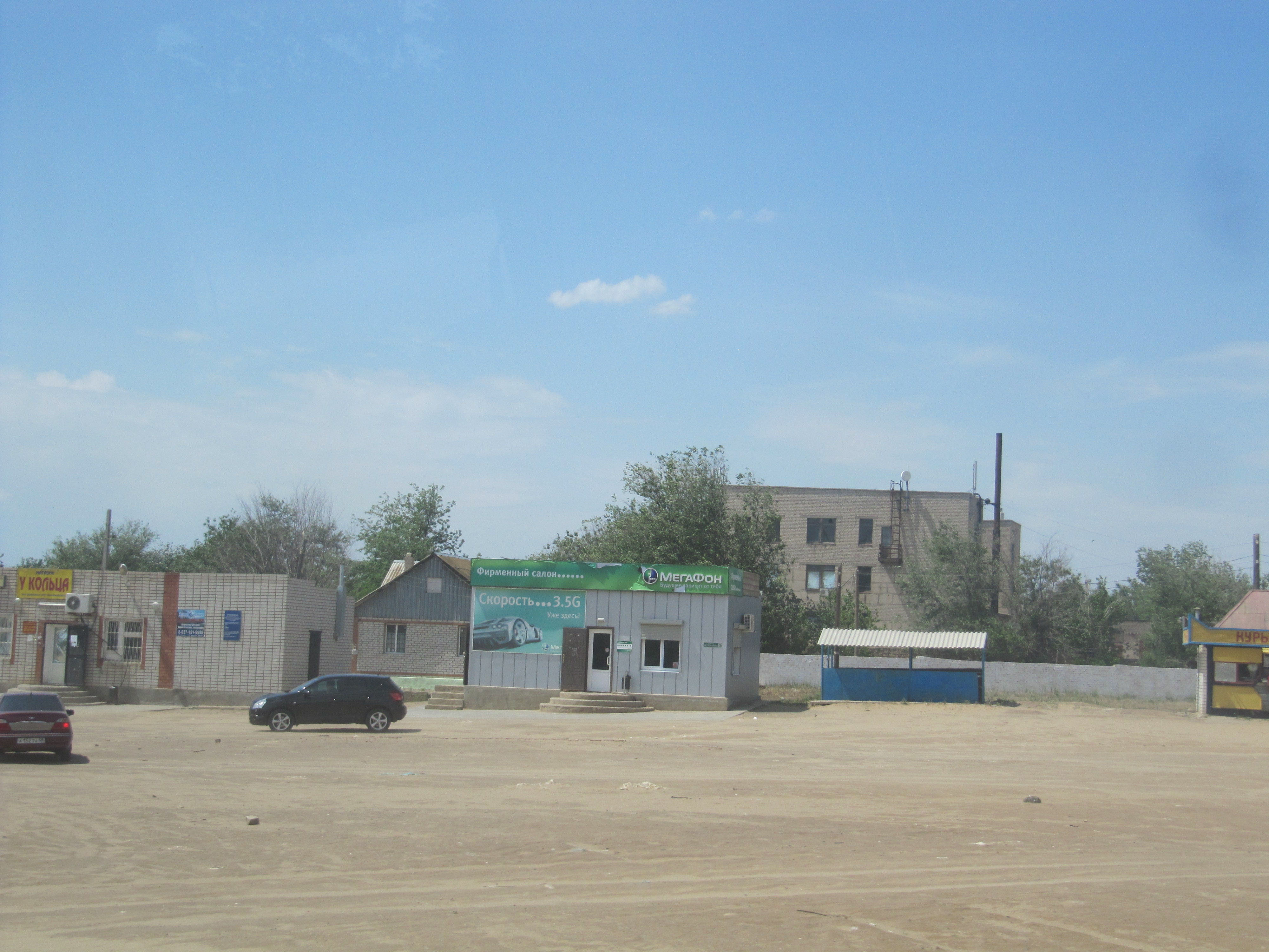 Кетченеры, Калмыкия